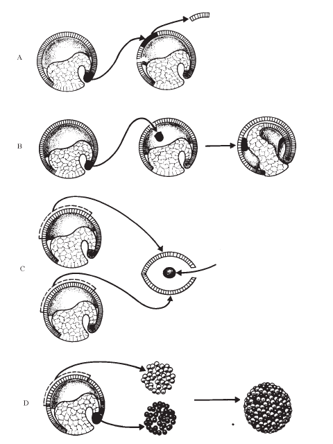 Mõned näited arengubioloogia meetodeist amfiibi embrüotega. A — Spemanni transplantatsioonimeetod; B — Mangoldi implantatsioonimeetod; C — Holtfreteri eksplantatsioonimeetod; D — dissotsieerimine-reagregatsioon.